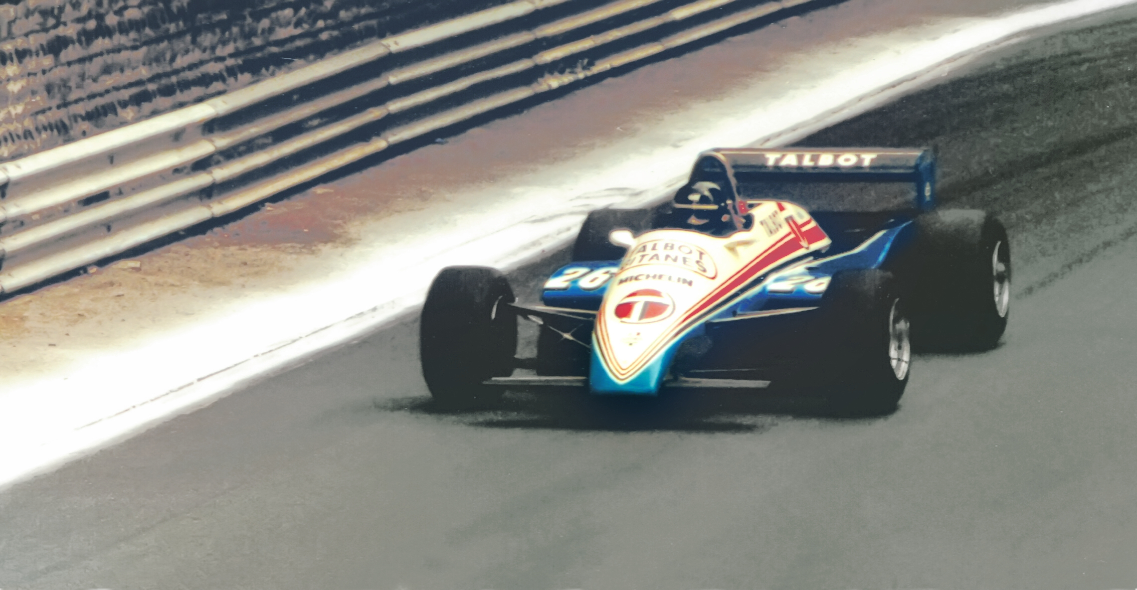 Jacques Laffite demonstrating a Ligier Formula One car at the 1982 Grand Prix de Pau.